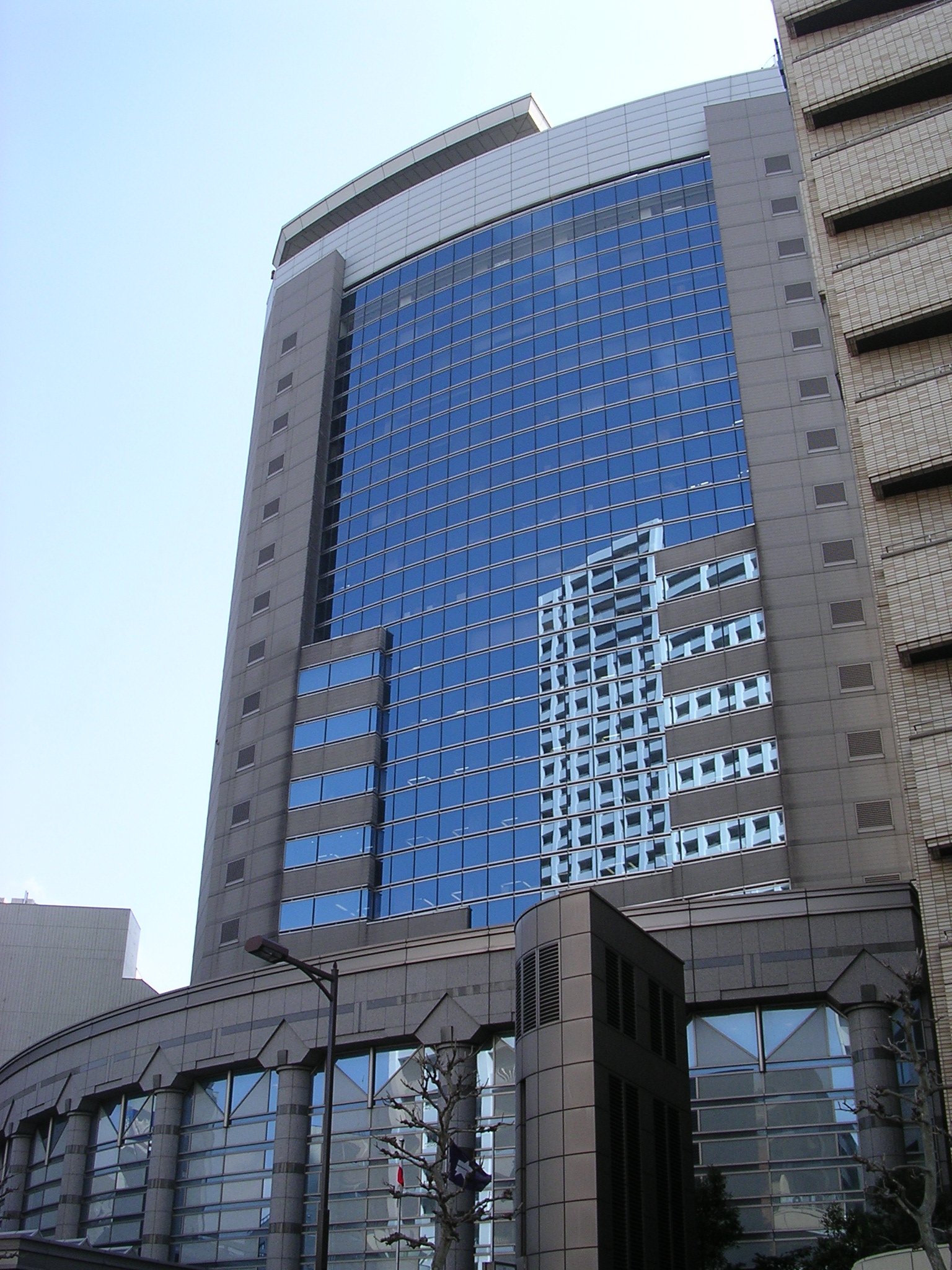 2007年3月22日、練馬区豊玉北5丁目、千川通りより撮影。